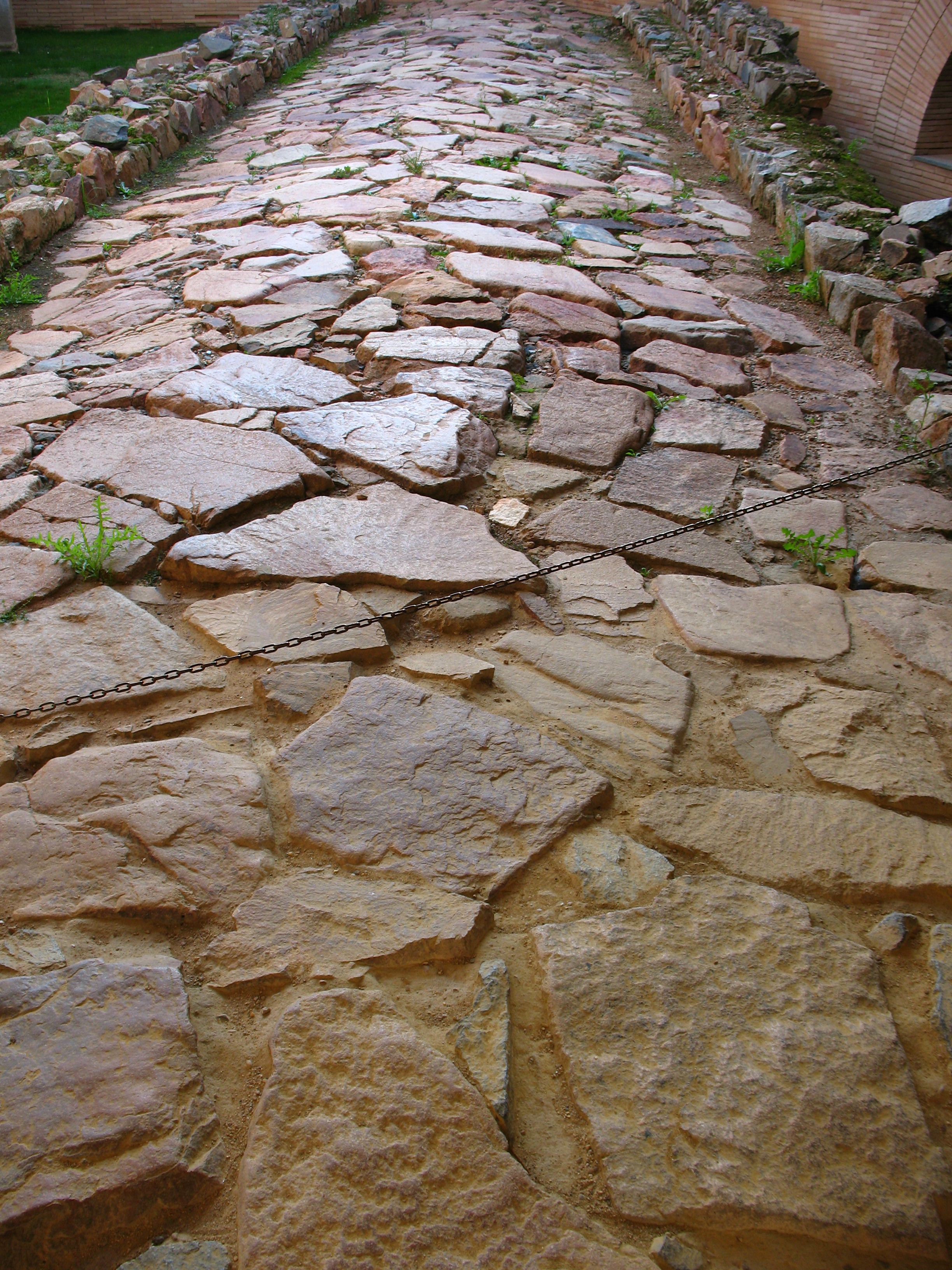 Calzada romana, a su paso por el Museo Nacional de Arte Romano de Mérida (España)